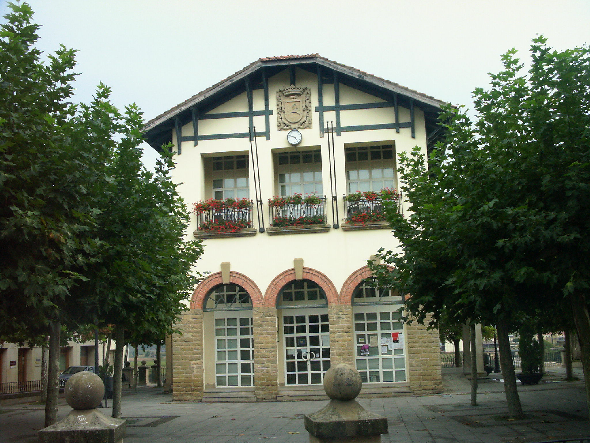 Lapuebla Labarkako udaletxea.